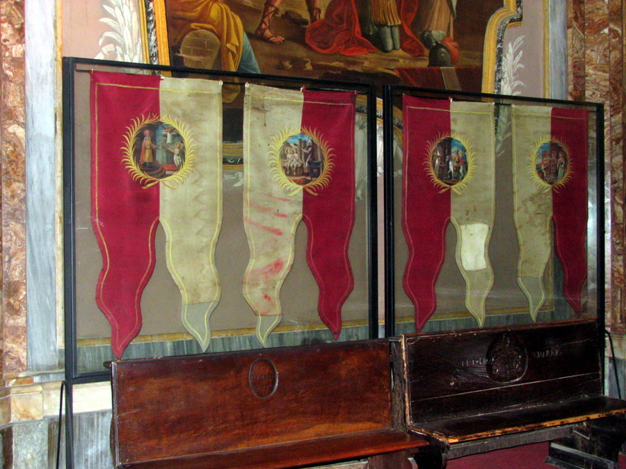 Asti, Collegiata di San Secondo, cappella di San Secondo, bandiere antiche